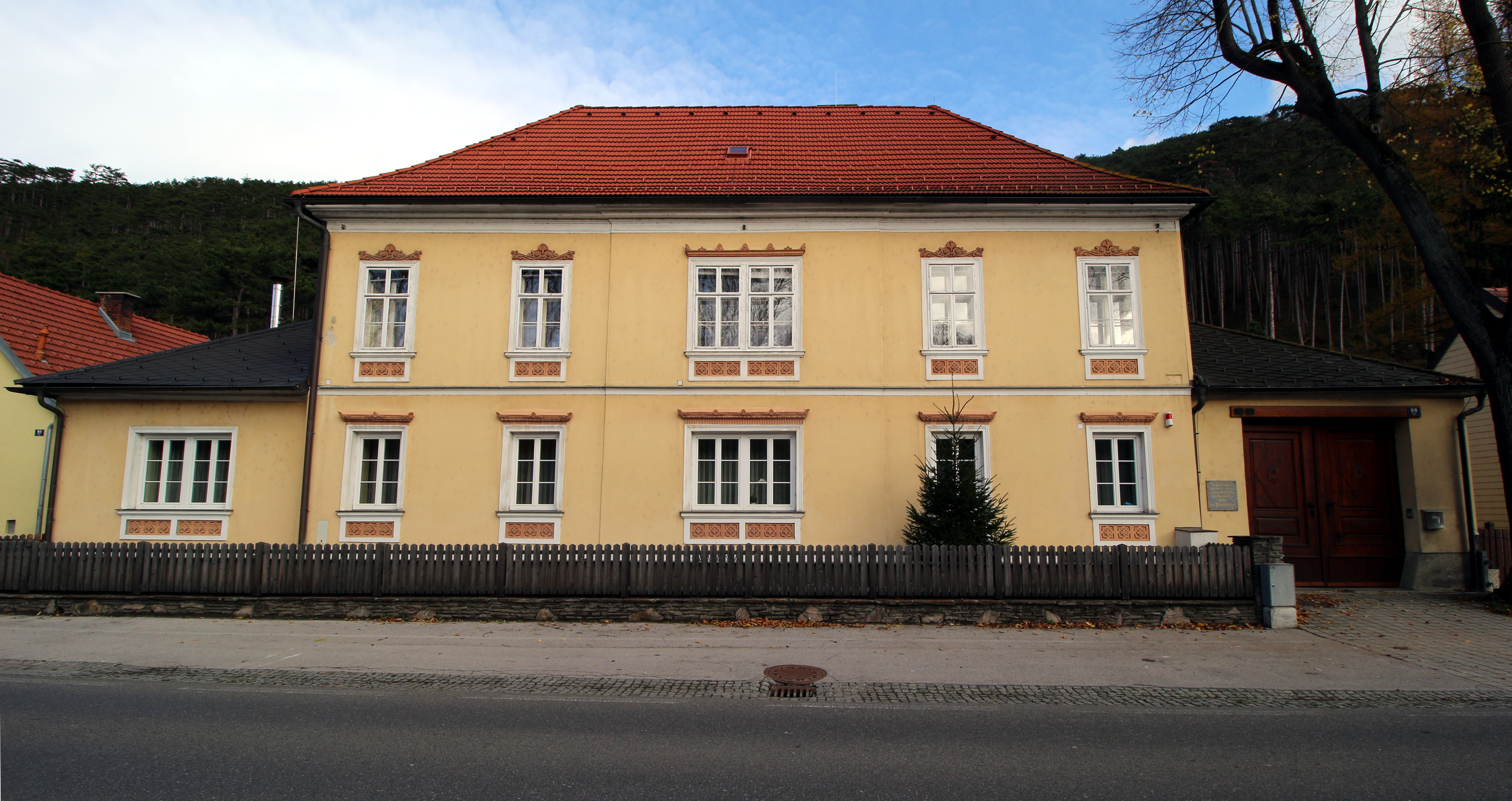 Sterbehaus von Petar Preradović in Fahrafeld, Gemeinde Pottenstein, Niederösterreich.